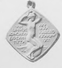 Odznaka wybita z okazji VIII Światowego Kongresu Esperantystów w Krakowie w 1912 roku.